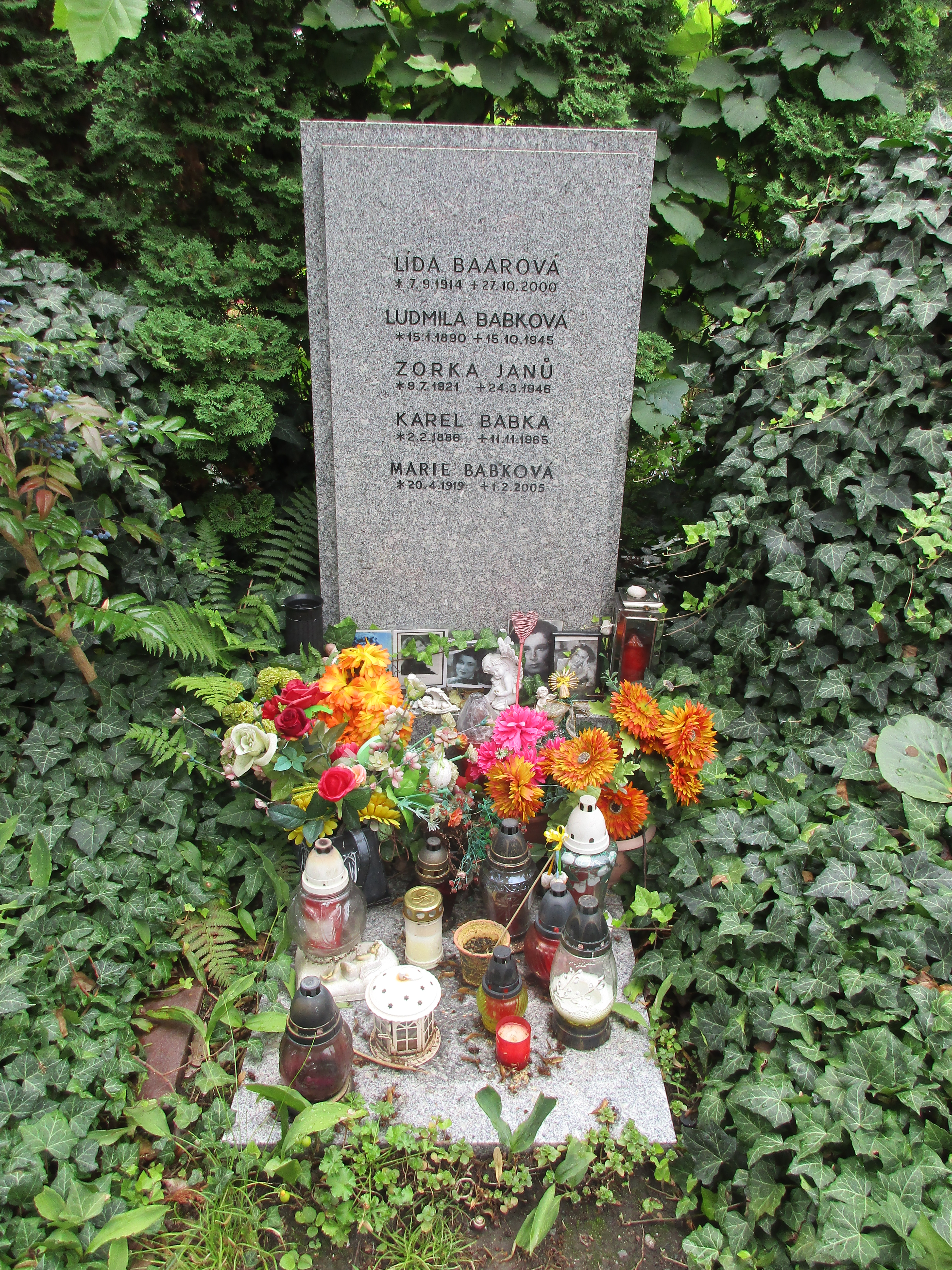 Lída Baarová -vl.jm. Ludmila Babková, provdaná Kopecká a Lundwallová (1914 - 2000), česká herečka.